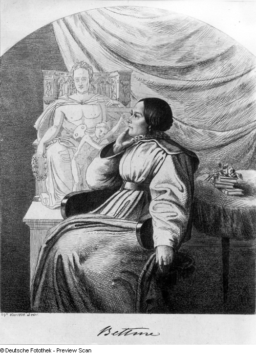 Bettina von Arnim mit dem Entwurf ihres Goethedenkmals, Radierung im Kupferstichkabinett Dresden